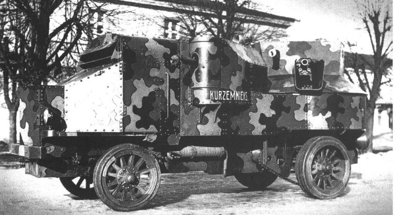 Российский пушечно-пулемётный бронеавтомобиль «Гарфорд-Путилов» — трофей белой латвийской армии, в которой получил имя «Kurzemnieks» ("Курземец").